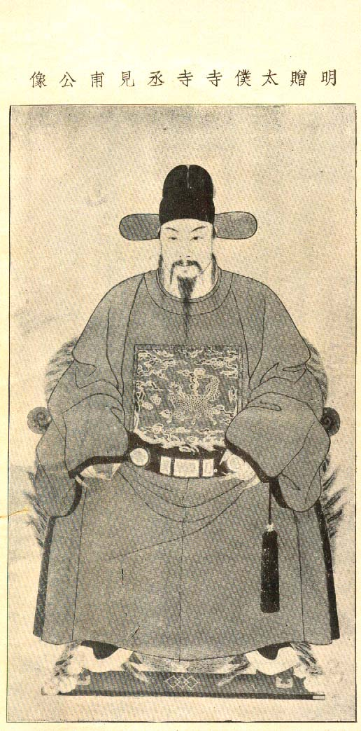 [明] 谢志望像 来自 此图为二维平面艺术（古画），作者逝世已逾百年，无特殊版权。 参见：民国图书，《明代四门谢氏24祖像》